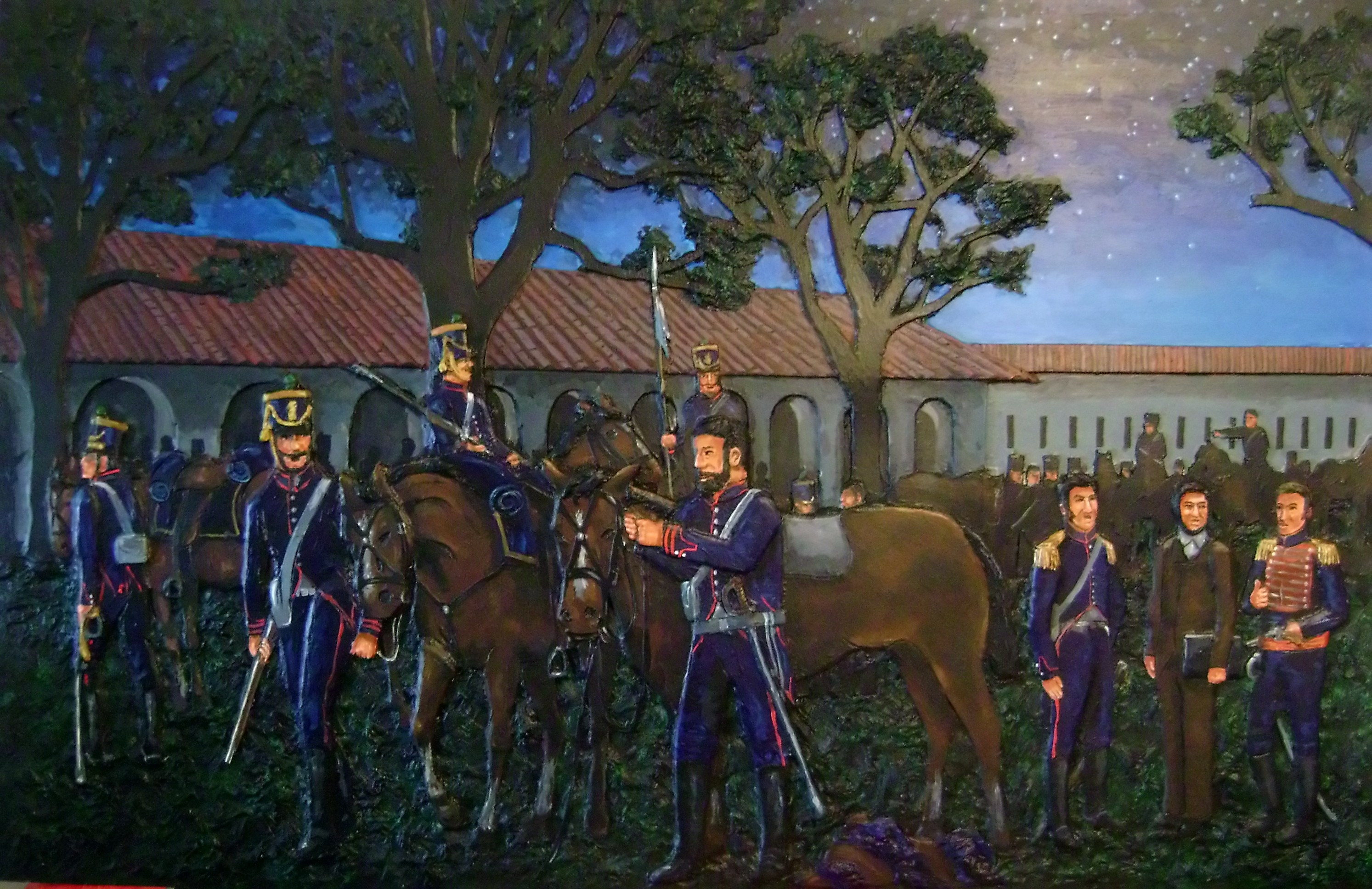 Pintura sobre relieve. 1,20 x 0,75 m. Preparativos para el Combate de San Lorenzo, en el patio del Convento San Carlos. Autor: Alberto Nassivera